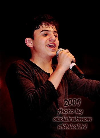 Abdulmajeed Al-Fozan